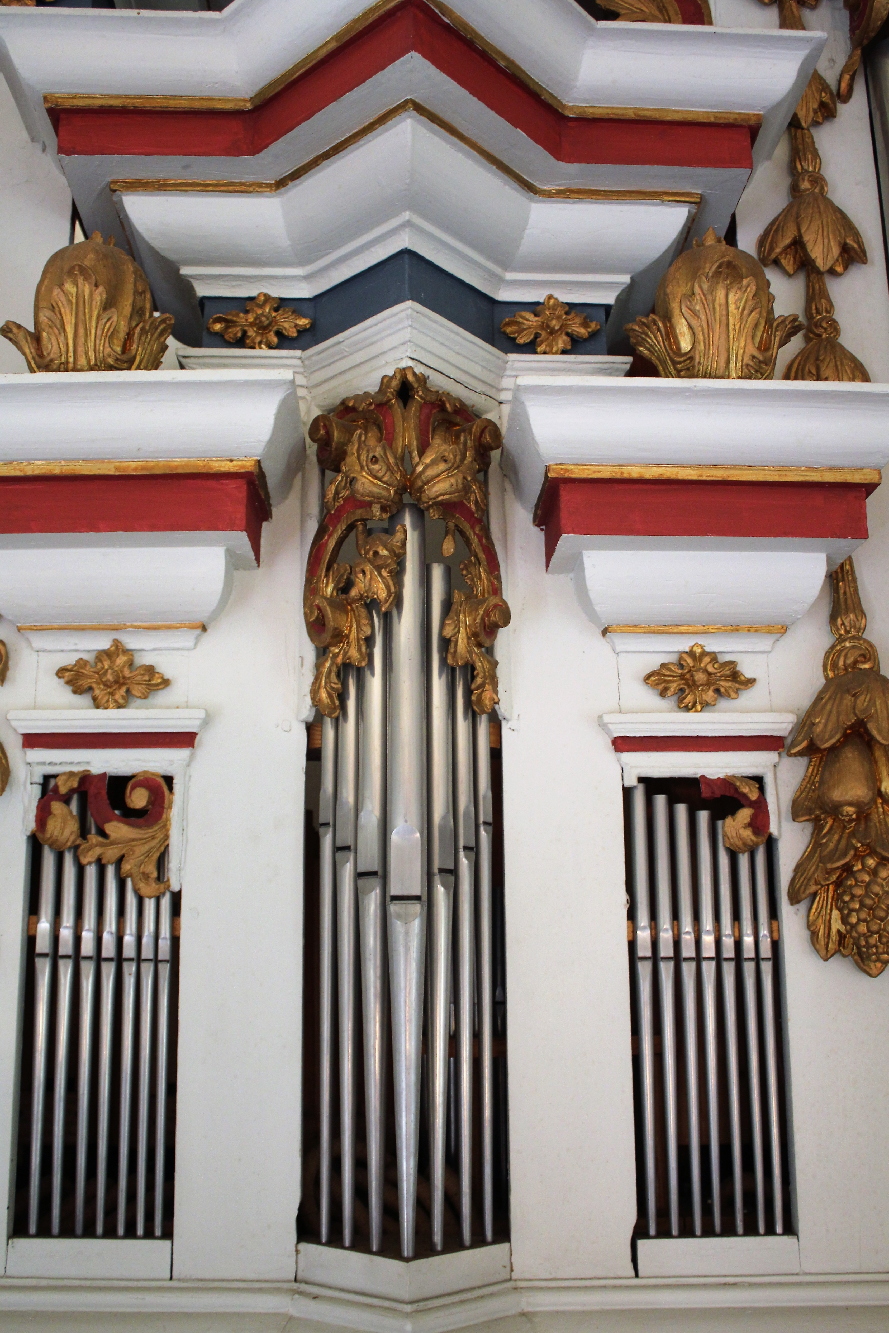 Evangelische Kirche St. Gotthardt, Rohnstedt, Großenehrich, Thüringen, Deutschland